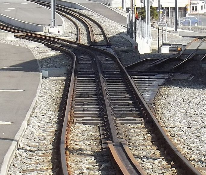 Neuartige Federweichen der Rigi-Bahnen in Arth-Goldau